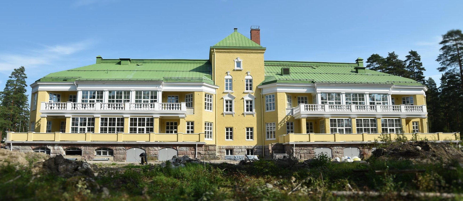 Nastolan Aurinkolinnan eteläjulkisivu kesällä 2016